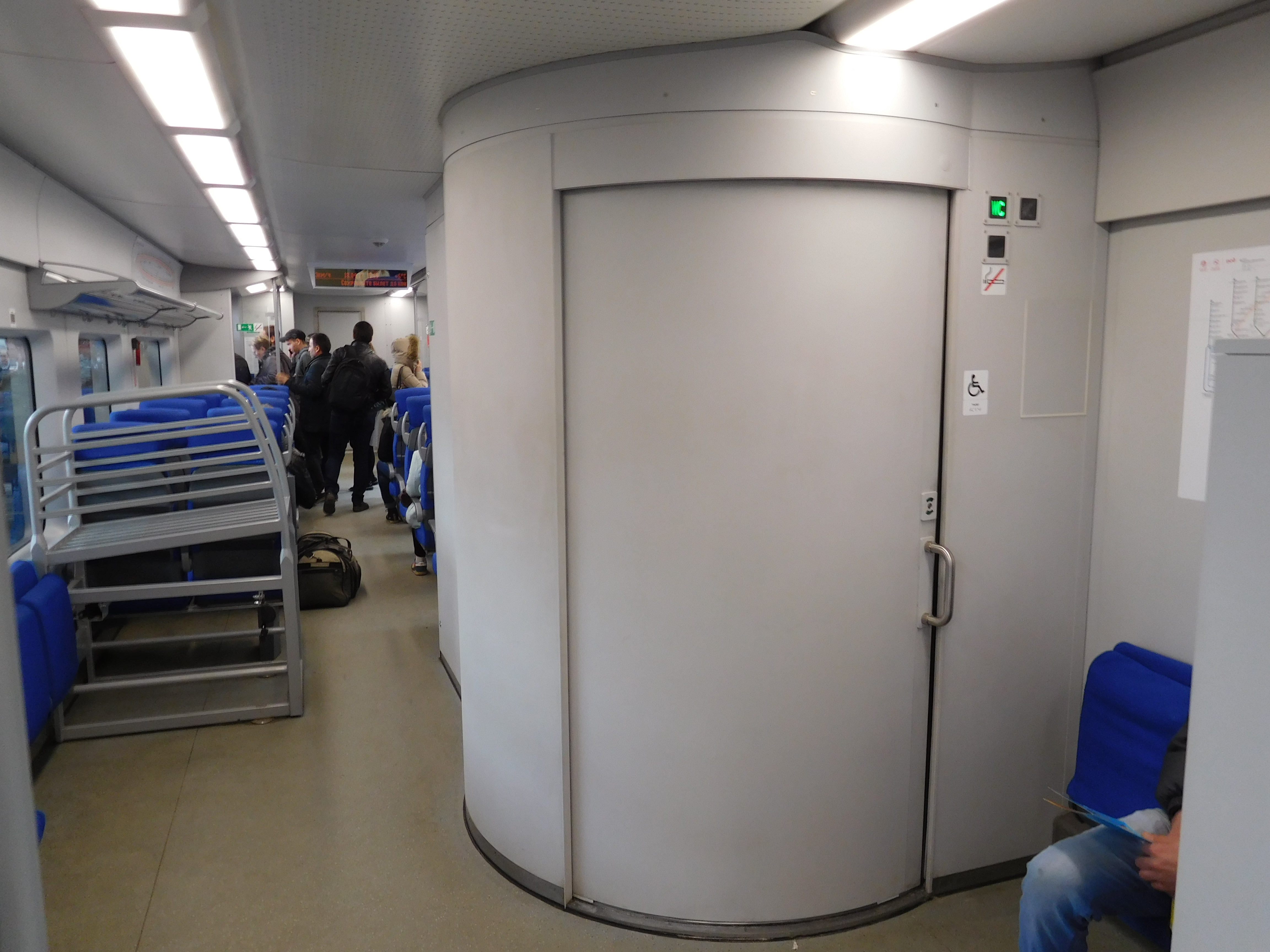 Санузел в головном вагоне электропоезда ЭС2Г